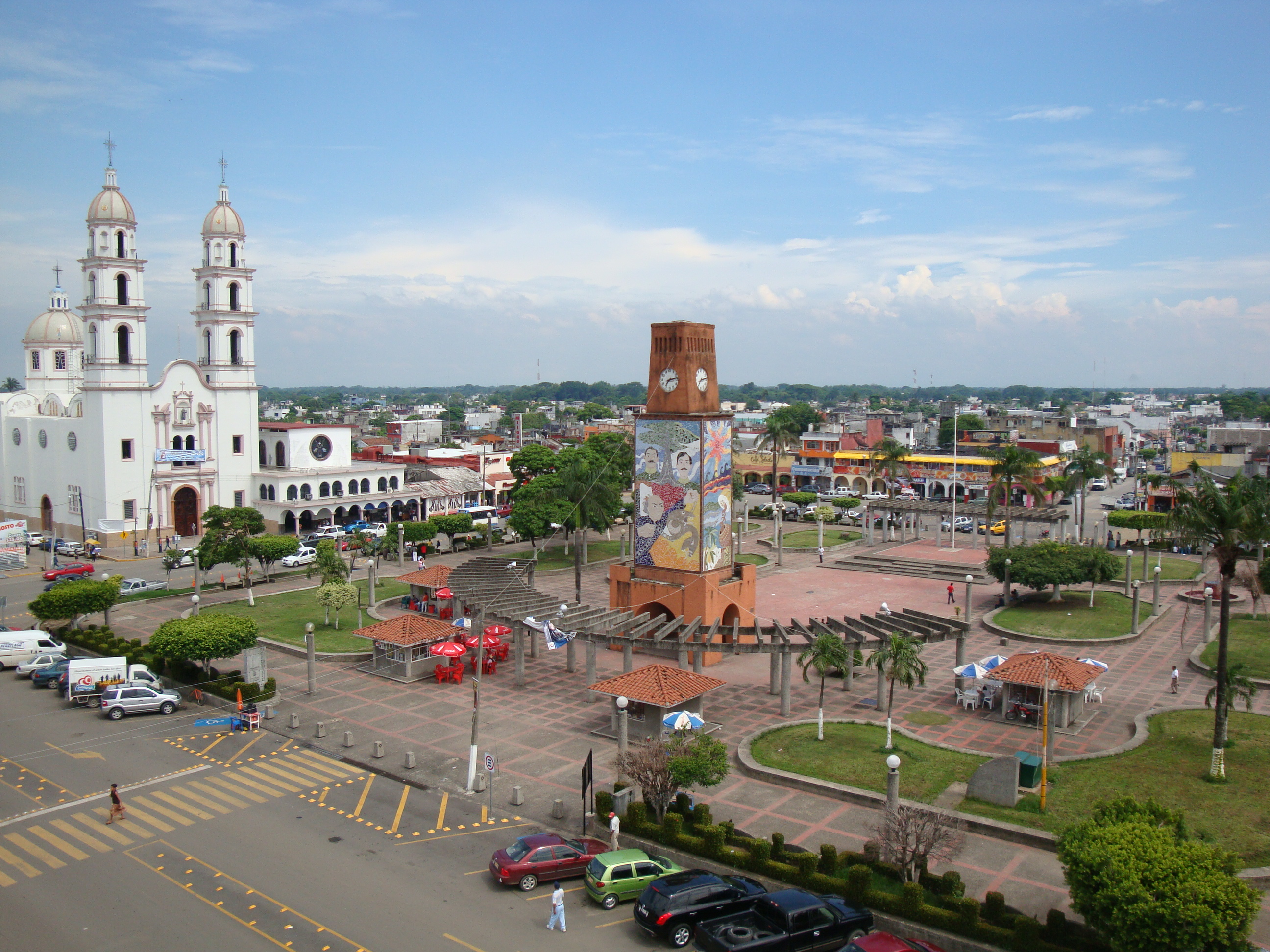 Panorámica del parque Independencia de la ciudad de Heroica Cárdenas, estado de Tabasco, México.